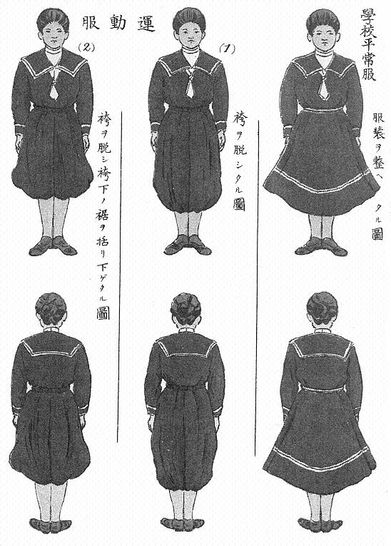 井口あくりが考案した運動服